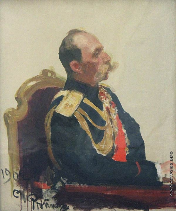 Партрэт У. Б. Фрэдэрыкса. Палатно, алей. Эцюд для карціны "Урачыстае пасяджэнне Дзяржаўўнага савета"